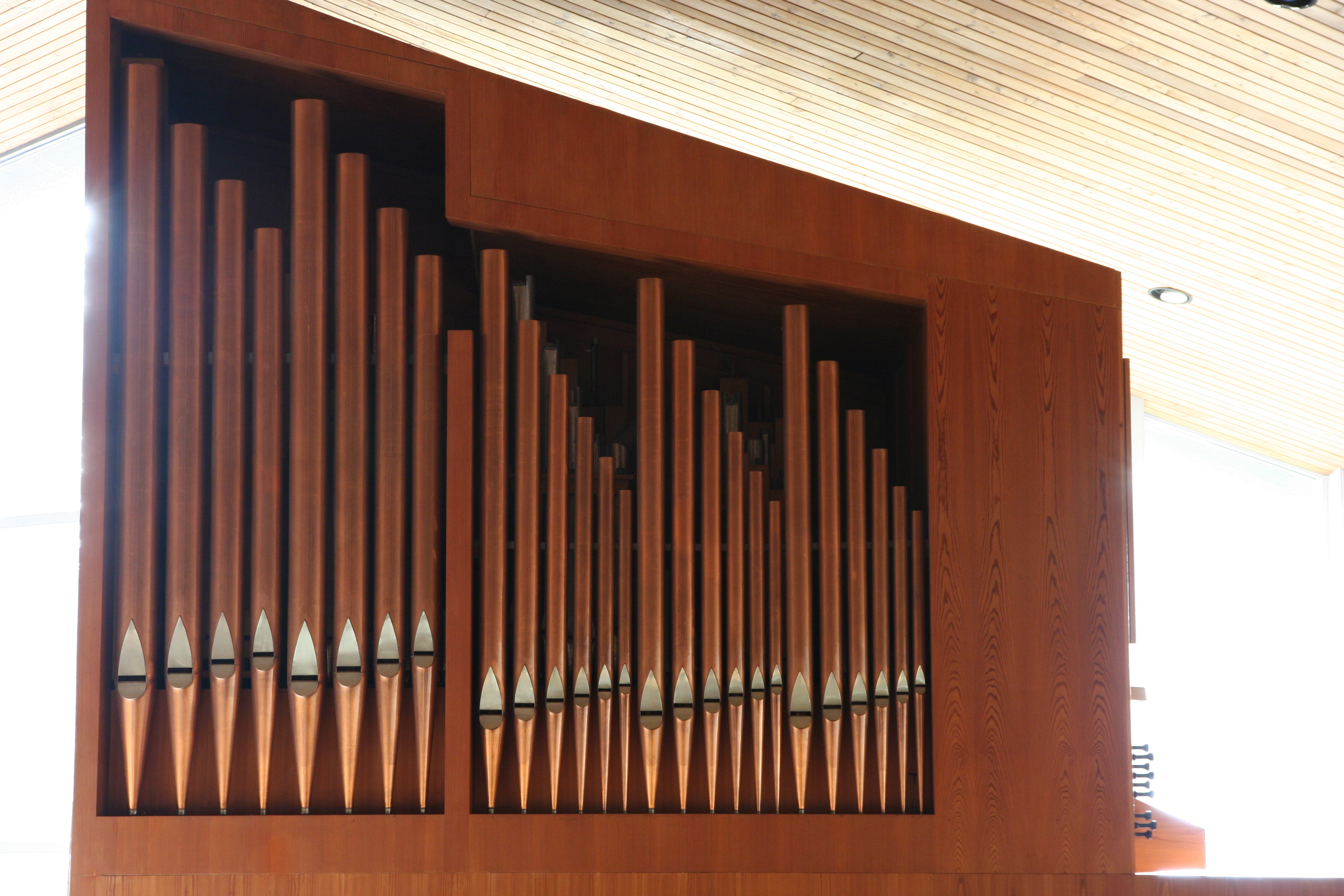 Römisch-katholische Kirche St. Franziskus Hüttwilen TG